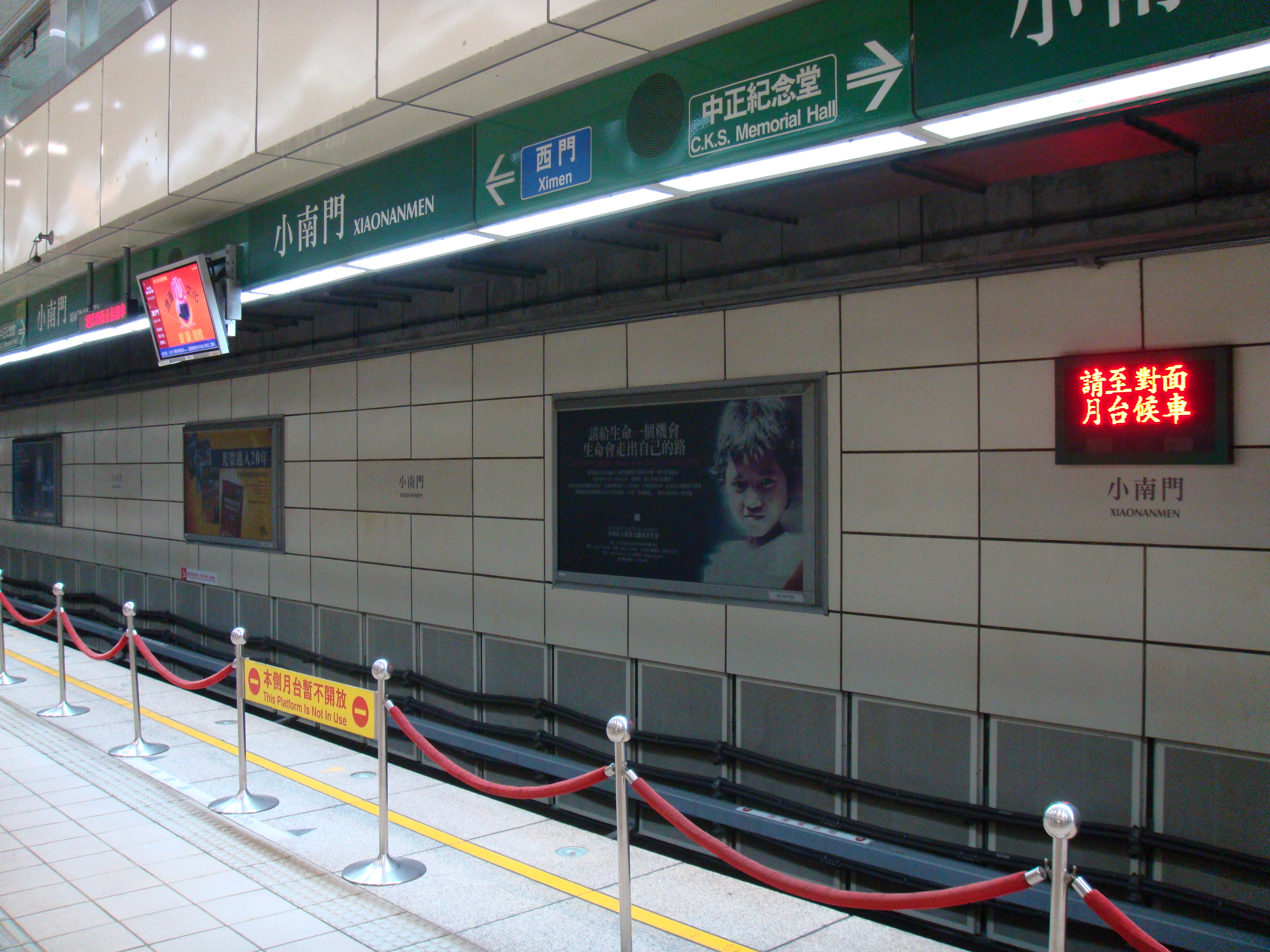 Xiaonanmen Station, Xiaonanmen Line, Taipei Metro, Taiwan.